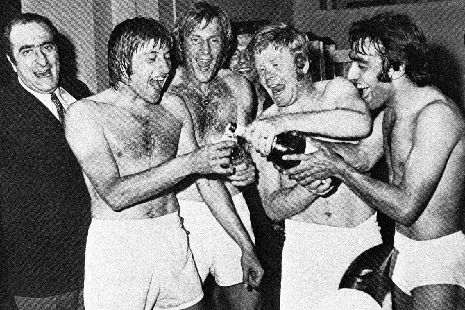 Roma, stadio Olimpico, 20 maggio 1973. Staff e calciatori della Juventus — da sinistra: il medico sociale dott. Francesco La Neve, Gianpietro Marchetti, Francesco Morini, Helmut Haller e Pietro Anastasi — festeggiano negli spogliatoi al termine la sfida contro la Roma, valevole per la 30ª e ultima giornata del campionato italiano di Serie A 1972-73 e vinta 2-1 dai torinesi; stante le contemporanee sconfitte delle rivali nella corsa-scudetto, Milan e Lazio, rispettivamente sui campi di Verona e Napoli, la formazione bianconera conquistò il suo 15º titolo italiano.